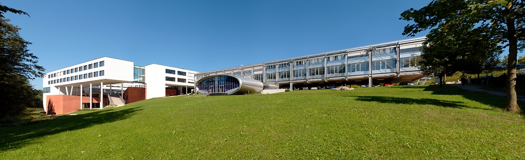 FH Oberösterreich Campus Hagenberg